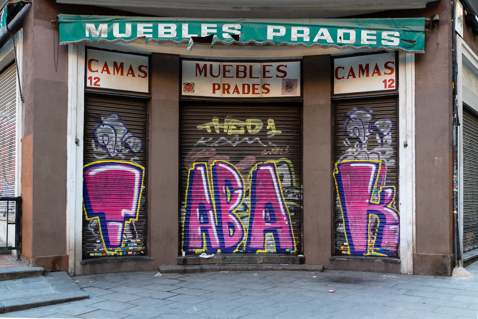 Calle de la Ribera de Curtidores 12, esquina calle Carnero, Madrid, España.